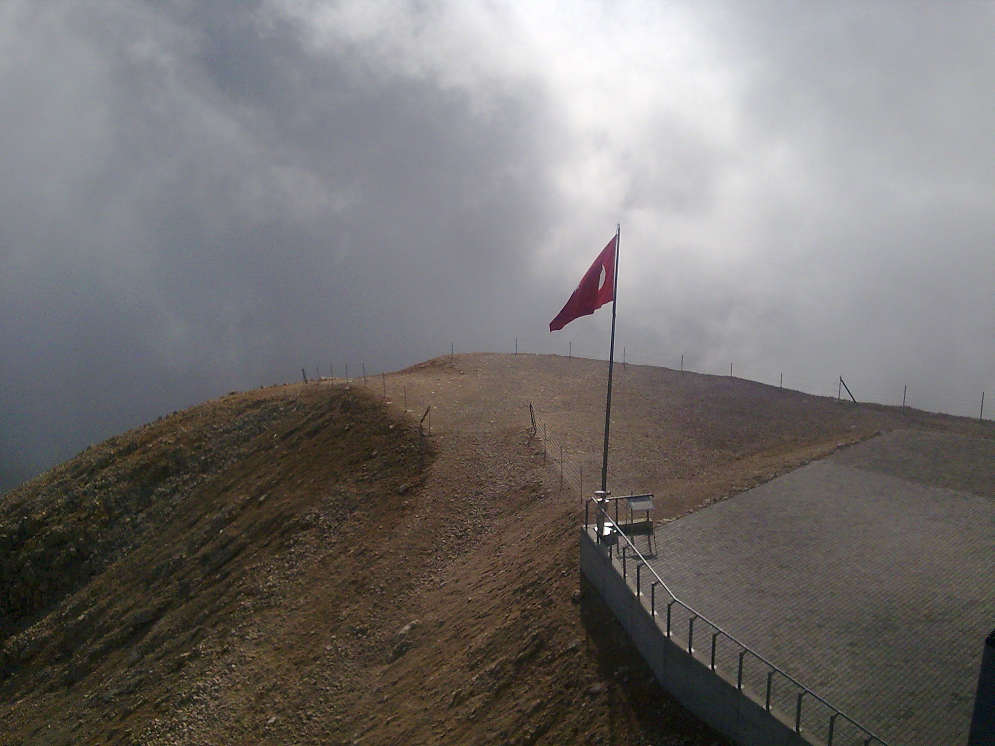 Toros Dağları'nın batısında bulunan Bey Dağları'ndan Tahtalı Dağı'ndan bir görüntü.